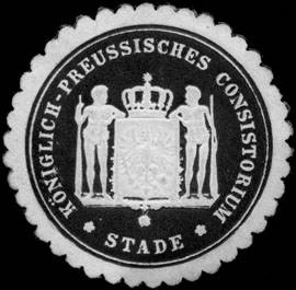 Sealing stamp Title: Königlich-Preussisches Consistorium - Stade Description: schwarz, weiß, geprägt Place: Stade size: 4 cm